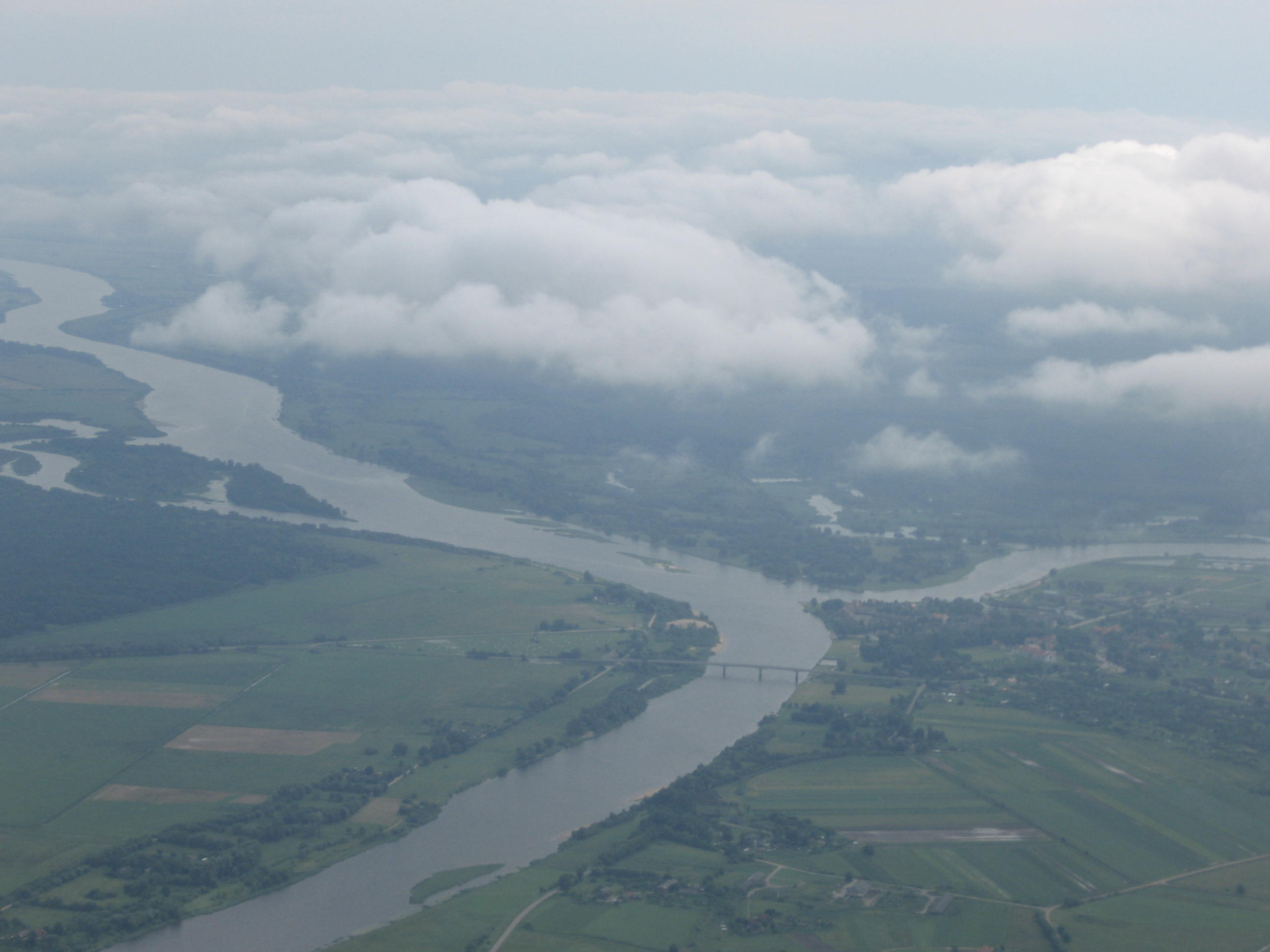 Rusnės sala ir Nemunas